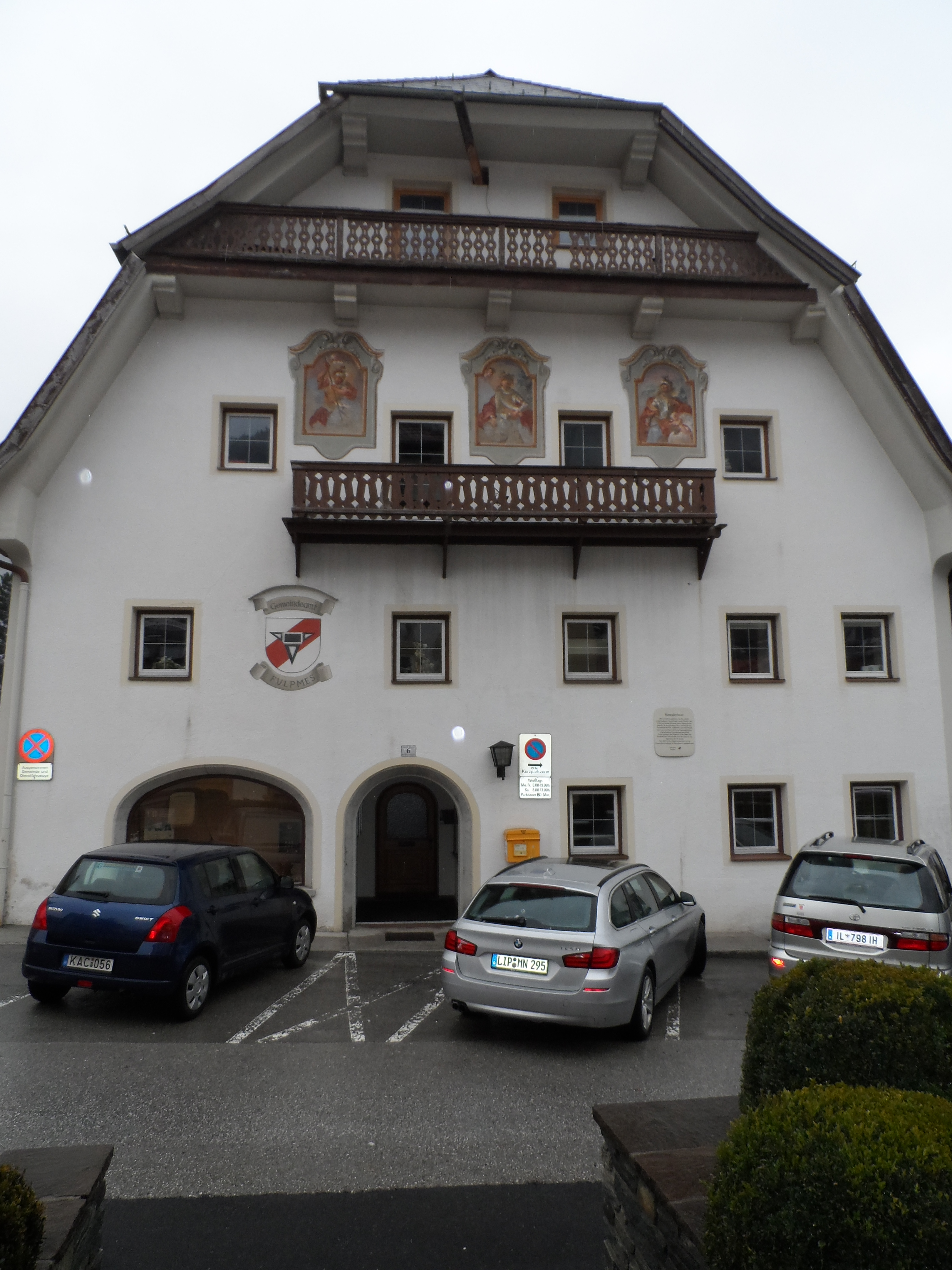 Gemeindeamt - Bahnstraße 6, Fulpmes